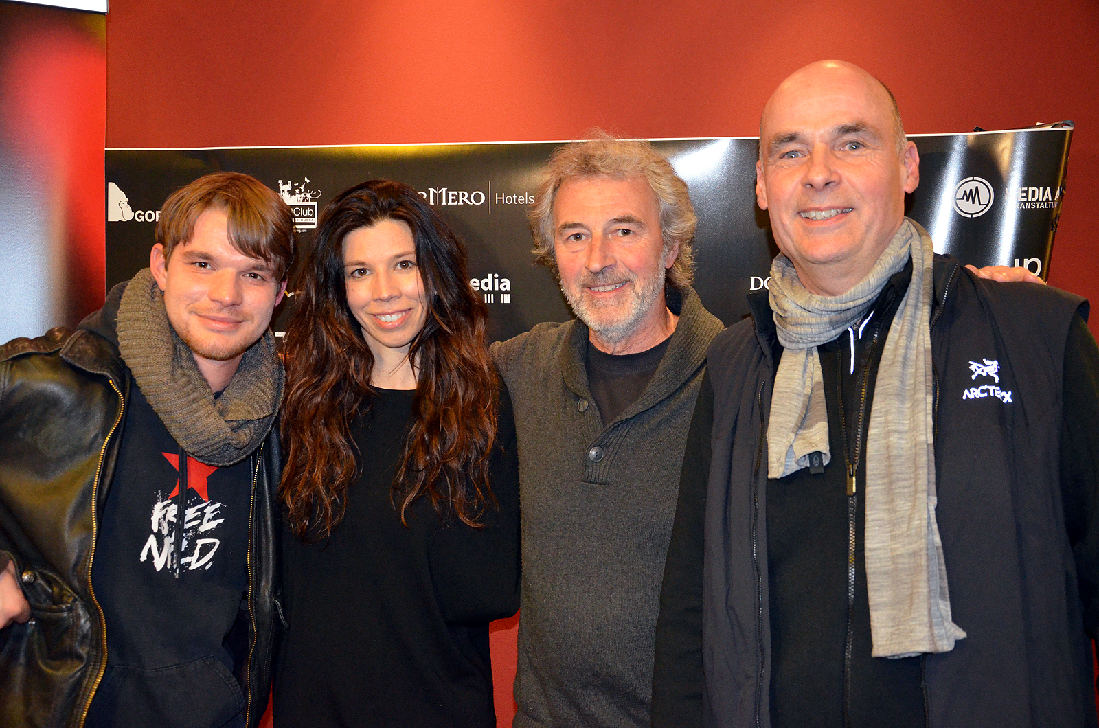 Zwischen den Film-Vorführungen zum UND BITTE – Filmpreis 2013 im Kino am Raschplatz in Hannover stellte sich die Jury den Fotografen (von links): Der Schauspieler Tobias Schenke, die Schauspielerin Franziska Stünkel, der Geschäftsführer vom Film & Medienbüro Niedersachsen (FMB) Karl Maier sowie der Initiator vom Up-and-coming Internationales Filmfestival Hannover Burkhard Inhülsen...